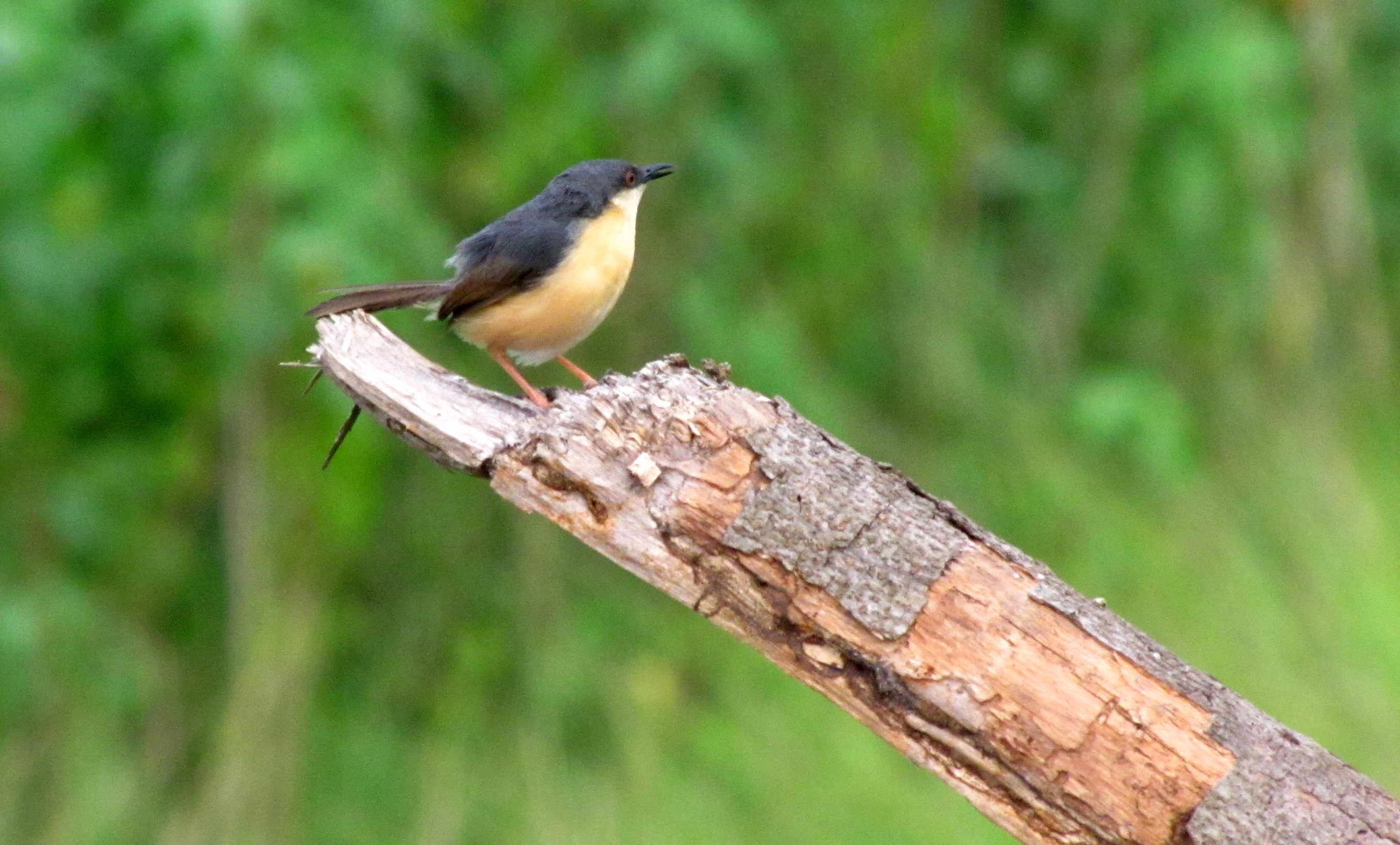 കുരുവിയുടെ വർഗ്ഗത്തിൽ പെട്ട ഒരിനം പക്ഷിയാണ് കതിർ‍വാലൻ കുരുവി . ഇംഗ്ലീഷ്: Ashy Prinia, Ashy Wren Warbler ശാസ്ത്രീയനാമം: Prinia Socialis പ്രീനിയ സോഷ്യാലിസ്. തുന്നാരൻ‌ എന്ന പക്ഷികളോട് അടുത്ത സാമ്യമുള്ള രൂപവും പ്രത്യേകതകളുമാണ്‌ ഇവക്ക്. വയലേലകളിലും കുറ്റിക്കാടുകളിലും ഇവയെ കാണാൻ സാധിക്കും. വയൽക്കുരുവി, താലിക്കുരുവി എന്നിവയും ഇതേ വർഗ്ഗത്തിൽ പെട്ട മറ്റു കുരുവികളാണ്‌. From Adatt, Thrissur Kole Wetlands This image is uploaded from observation number 272058 at India Biodiversity Portal, a source of nature observations in India.This tag does not indicate the copyright status of the attached work. A normal copyright tag is still required. See Commons:Licensing for more information.